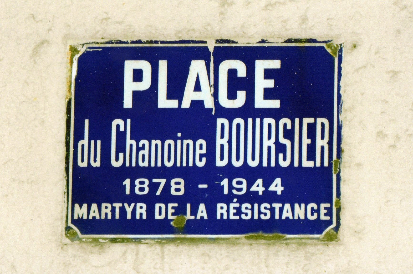 Photo de la plaque de rue à Villeurbanne